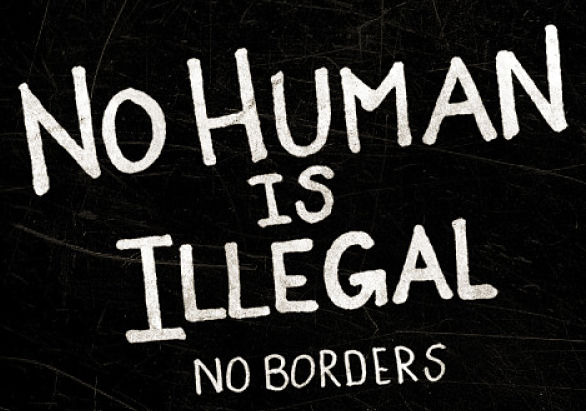 No Border (parfois écrit No Borders) désigne un réseau transnational de collectifs et d'individus investis dans les luttes pour la liberté de circulation et l'abolition des frontières.